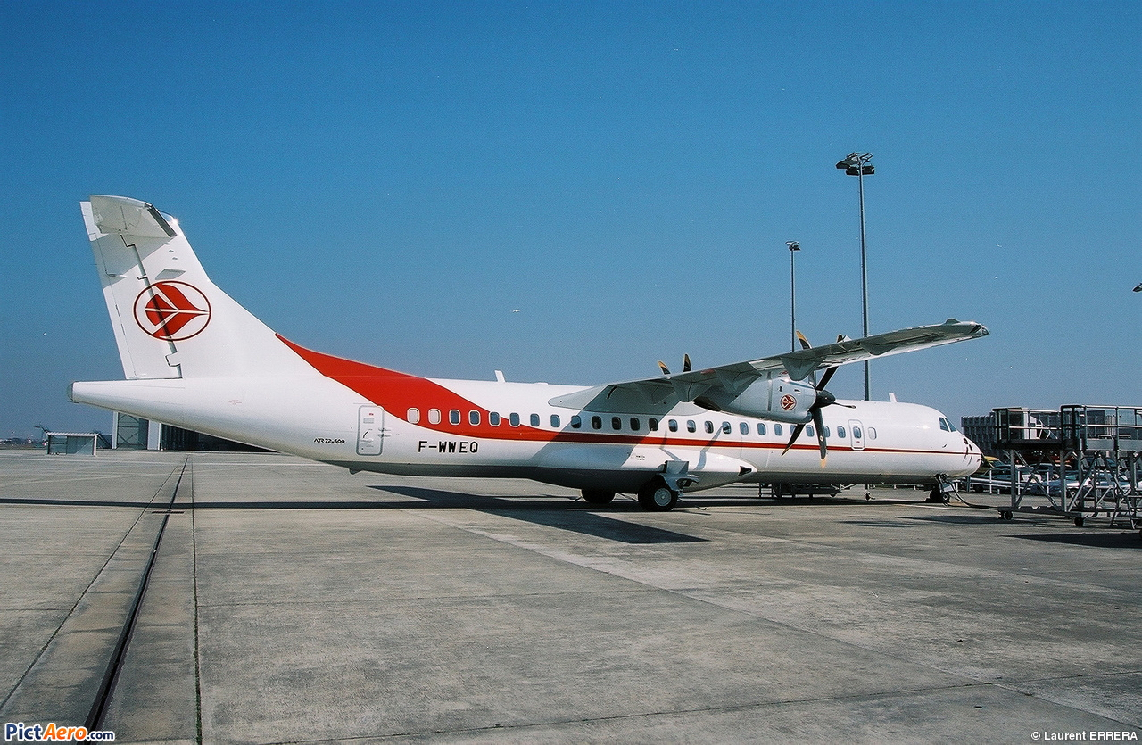 Photo prise à l'aéroport de Toulouse-Blagnac (LFBO) en France. Picture take at Toulouse-Blagnac Airport (LFBO) in France.